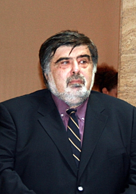 Svečano proglašenje i predstavljanje novih članova Hrvatske akademije znanosti i umjetnosti u Zagrebu